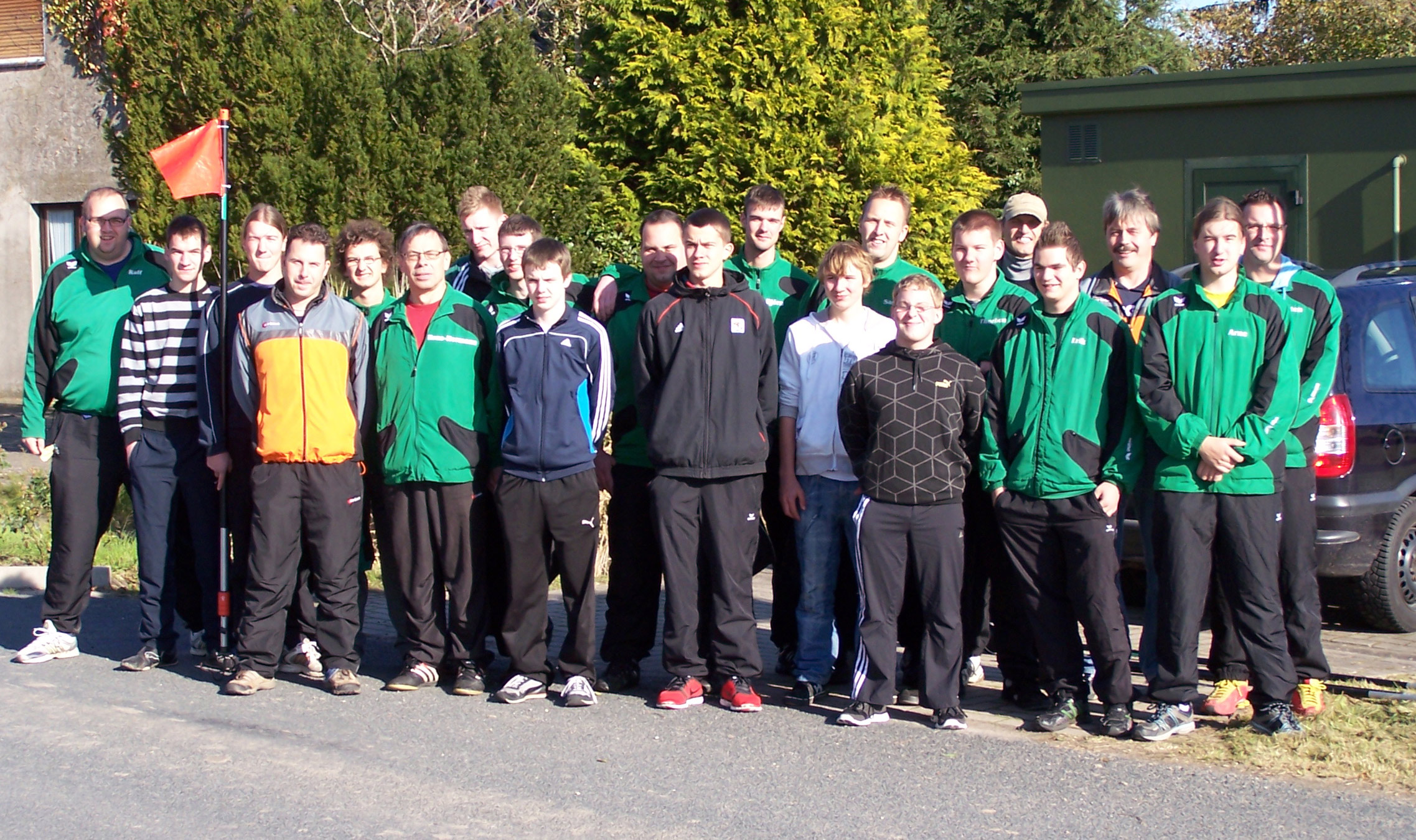 Erste Männermannschaft 2011